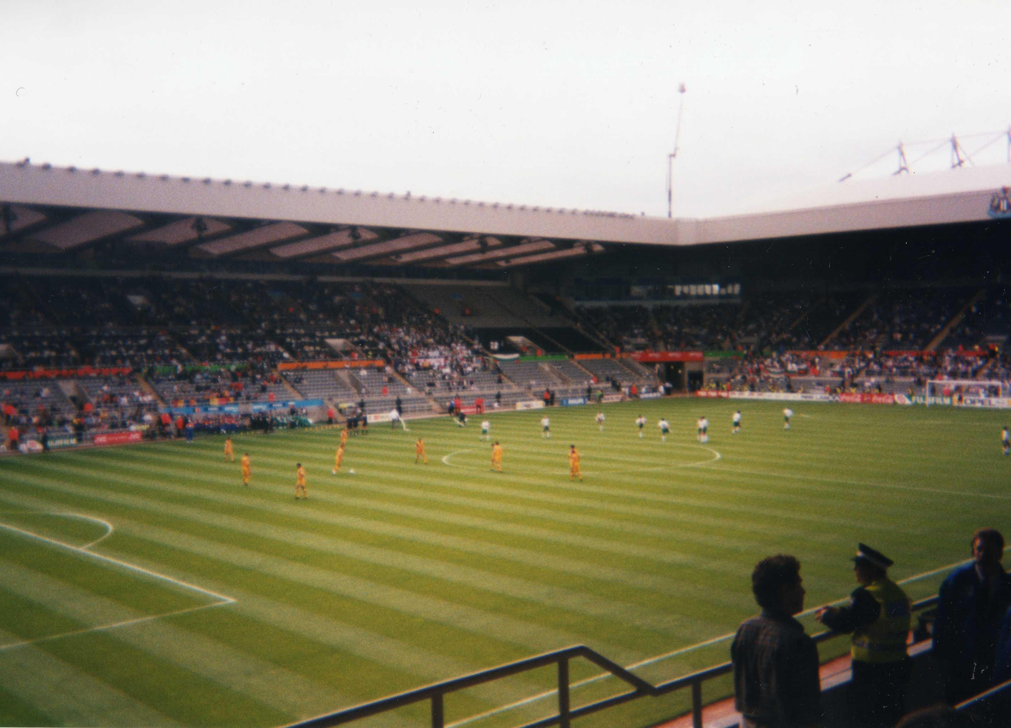 Bulgaria v Romania at UEFA Euro 96, St James' Park